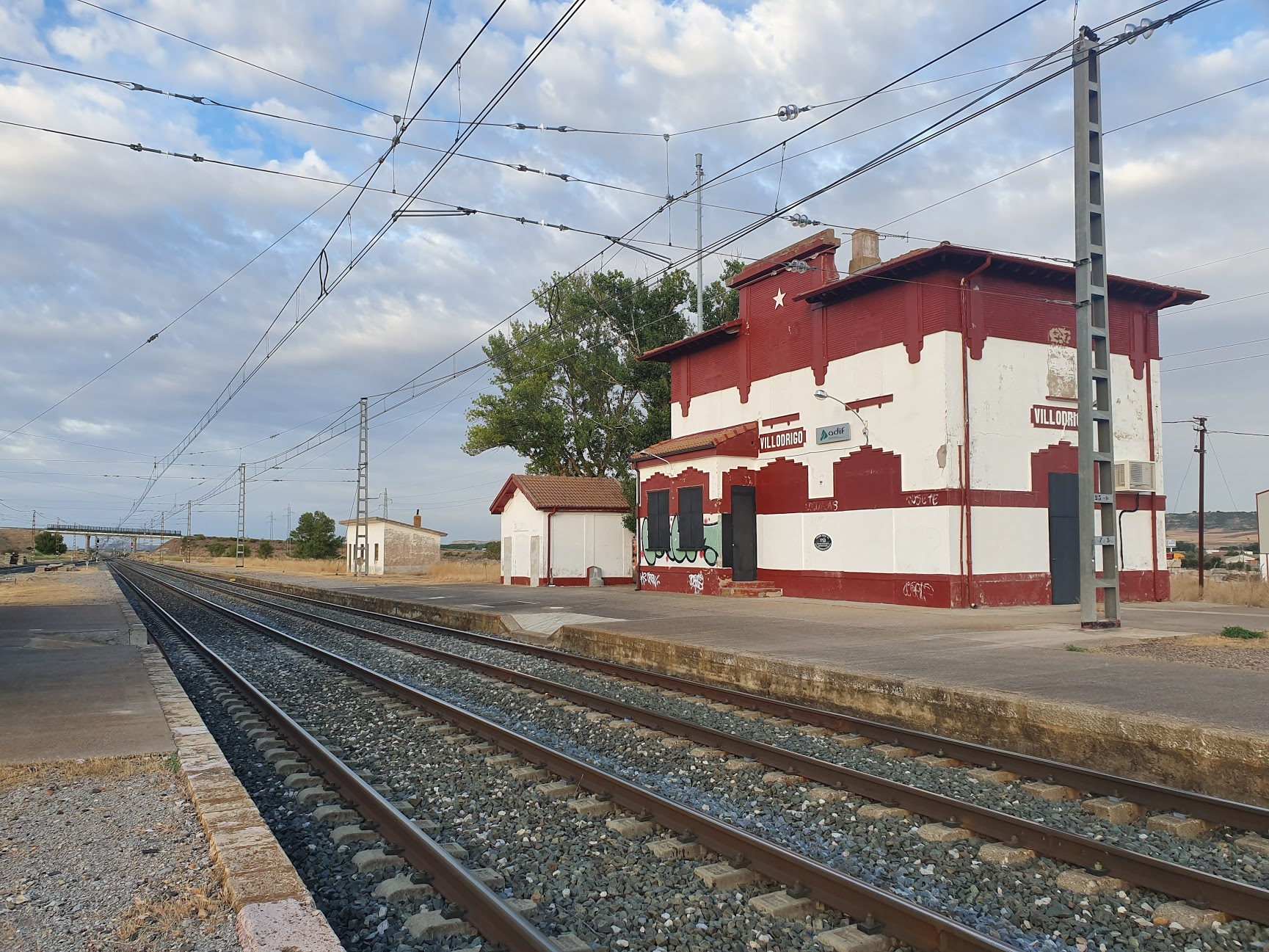 Estación de Villodrigo